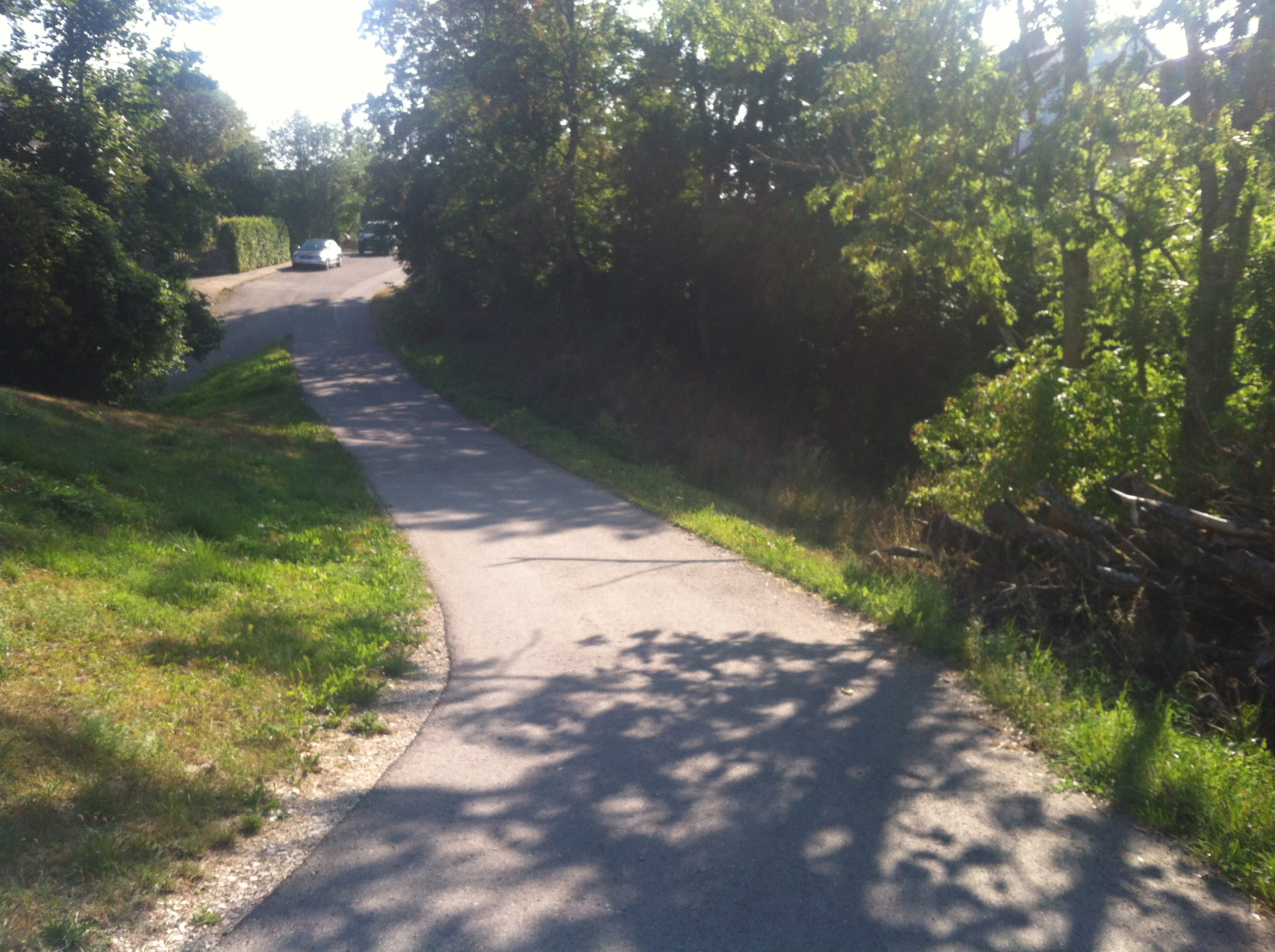 Blumberg, Stadt im Schwarzwald-Baar-Kreis in Baden-Württemberg. (Heutiger) Verbindungsweg über den ehemaligen (Hals-)Graben (mit Brücke) zwischen Burg & Stadt.